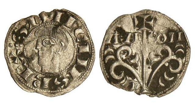 Dinero de Sancho Ramírez de Aragón. Anverso: leyenda: SANCIVS REX. Iconografía: Busto del rey de Aragón mirando a la izquierda. Reverso: leyenda: ARA-GON. Iconografía: Cruz procesional sobre vástago ornamentada con motivos vegetales a los flancos. Primera acuñación monetaria de un reino cristiano en la península ibérica.